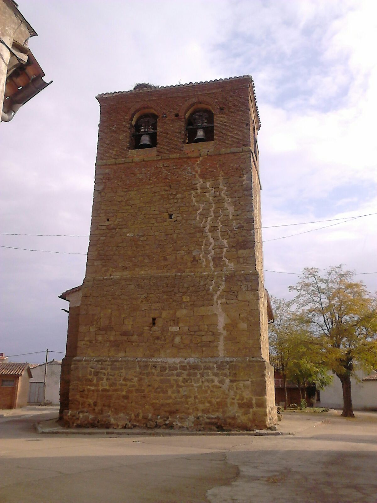 Iglesia de Santa Eufemia del Arroyo.